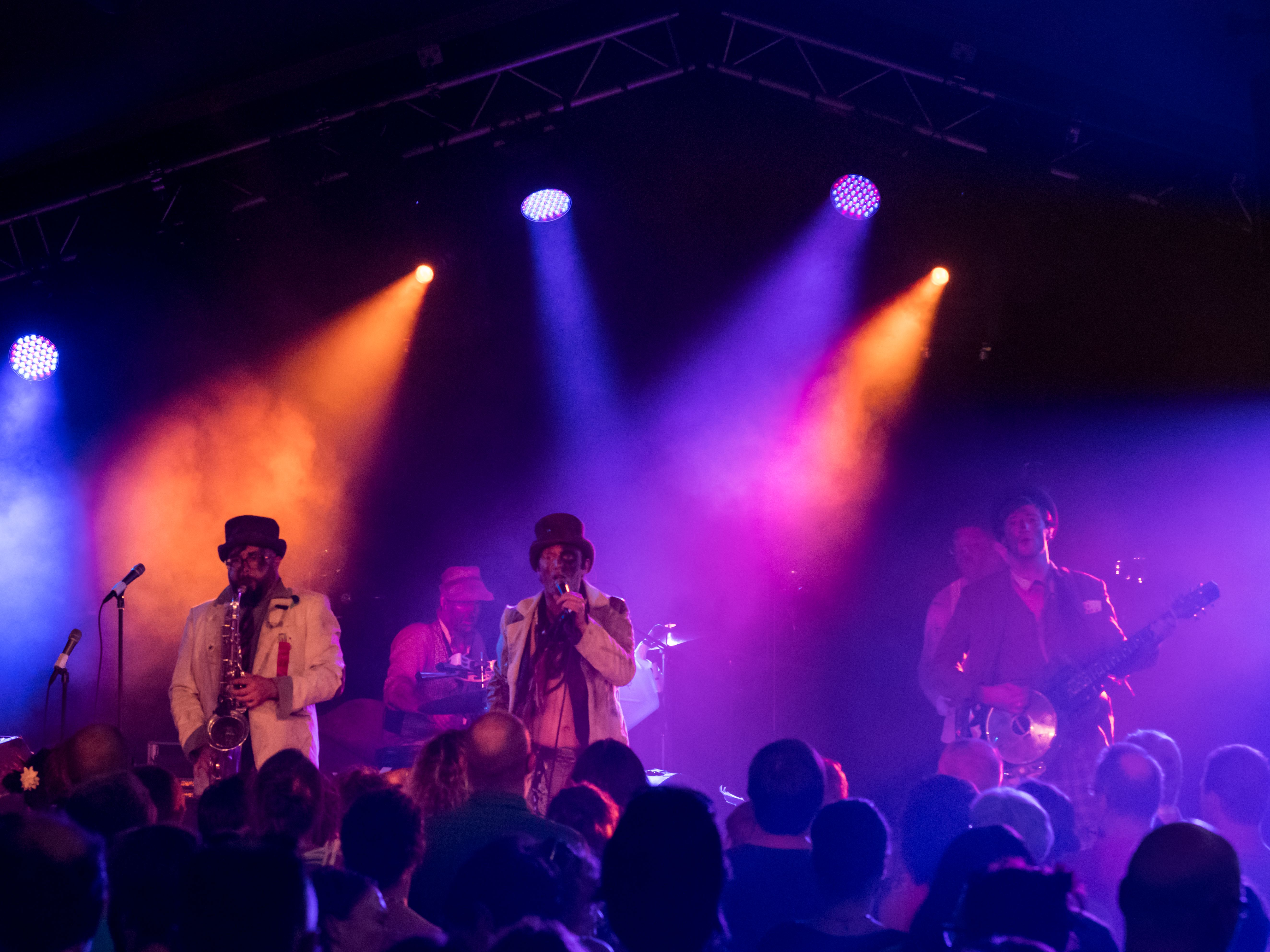 Bilder vom Zelt Musik Festival 2016 in Freiburg im Breisgau Die Gruppe "The Les Clöchards"